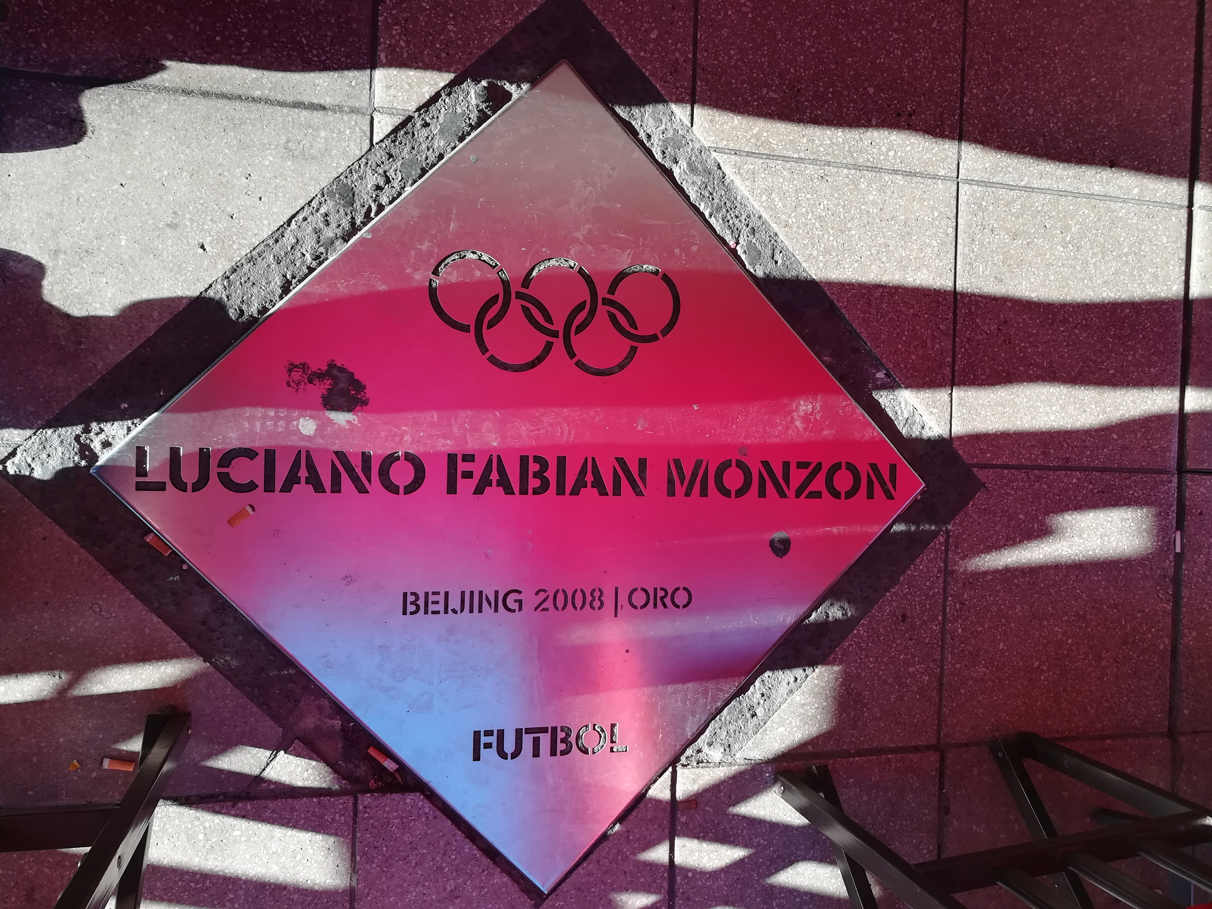 Paseo de los Olímpicos de los en la Avenida Pellegrini (Rosario).